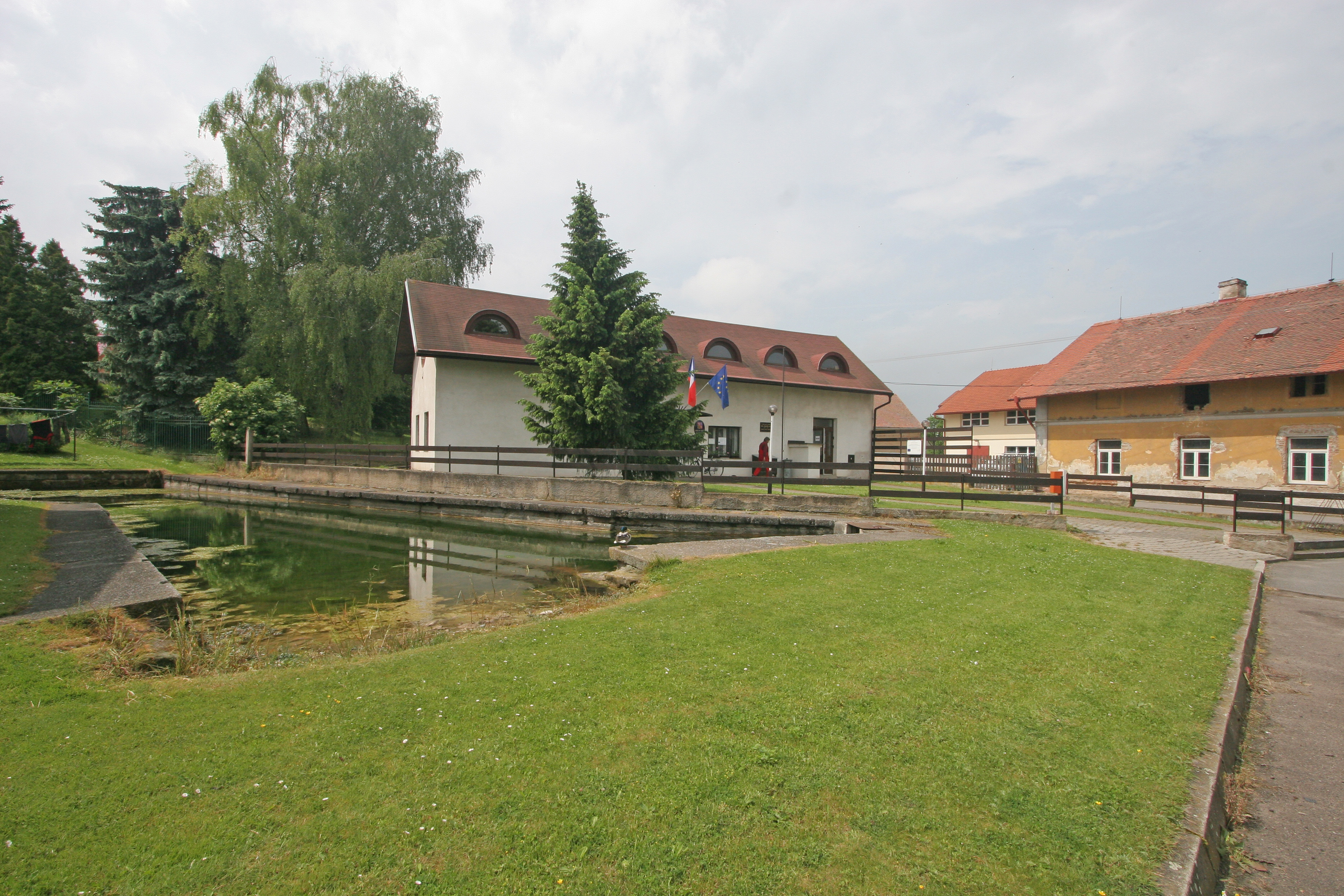 Rozhovice obecní úřad